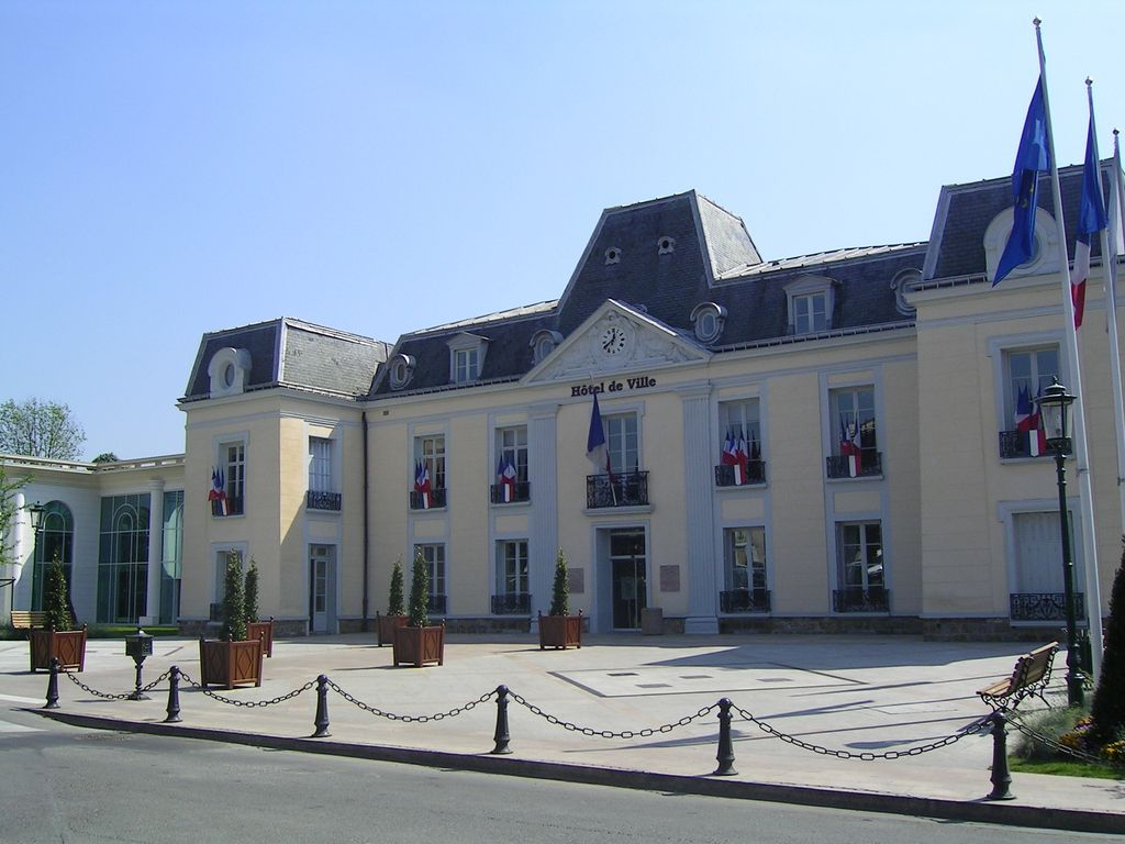 Hôtel-de-Ville, place Foch Photo personnelle (own work) de Marianna